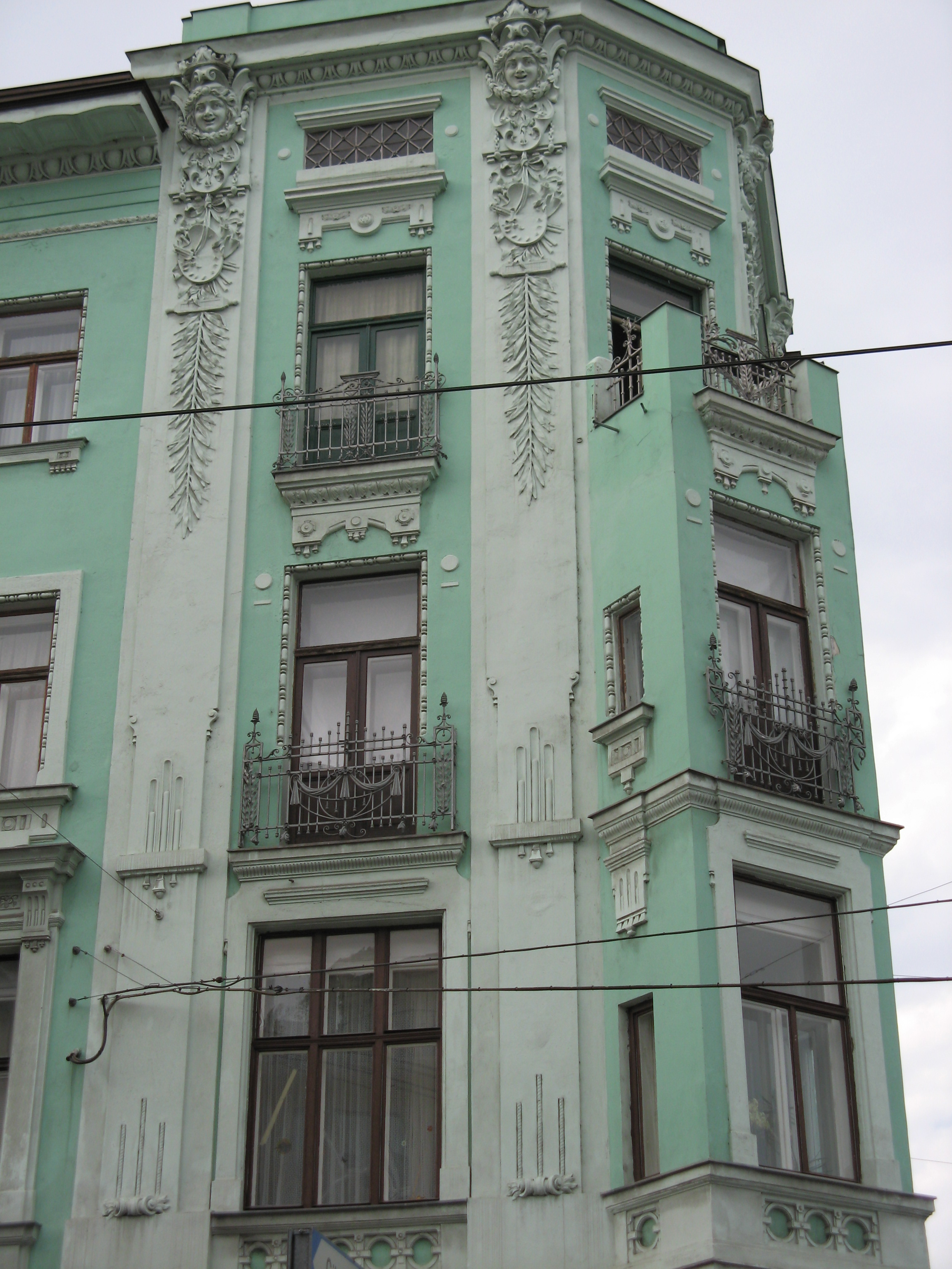 Haus Längenfeldgasse 4, Wien-Meidling